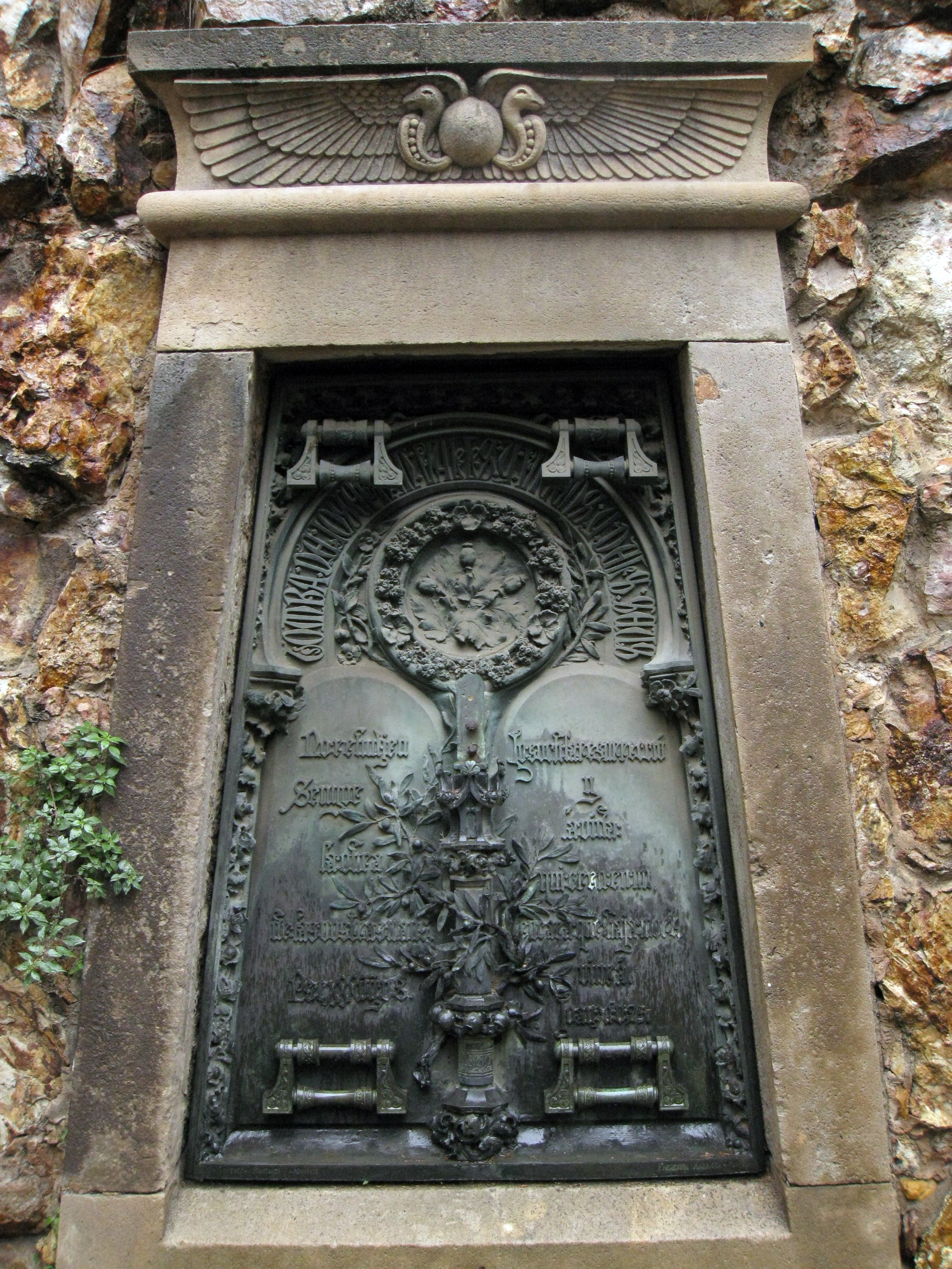 Cementiri de Montjuïc (Barcelona) Object location41° 21′ 11.63″ N, 2° 09′ 10.12″ E